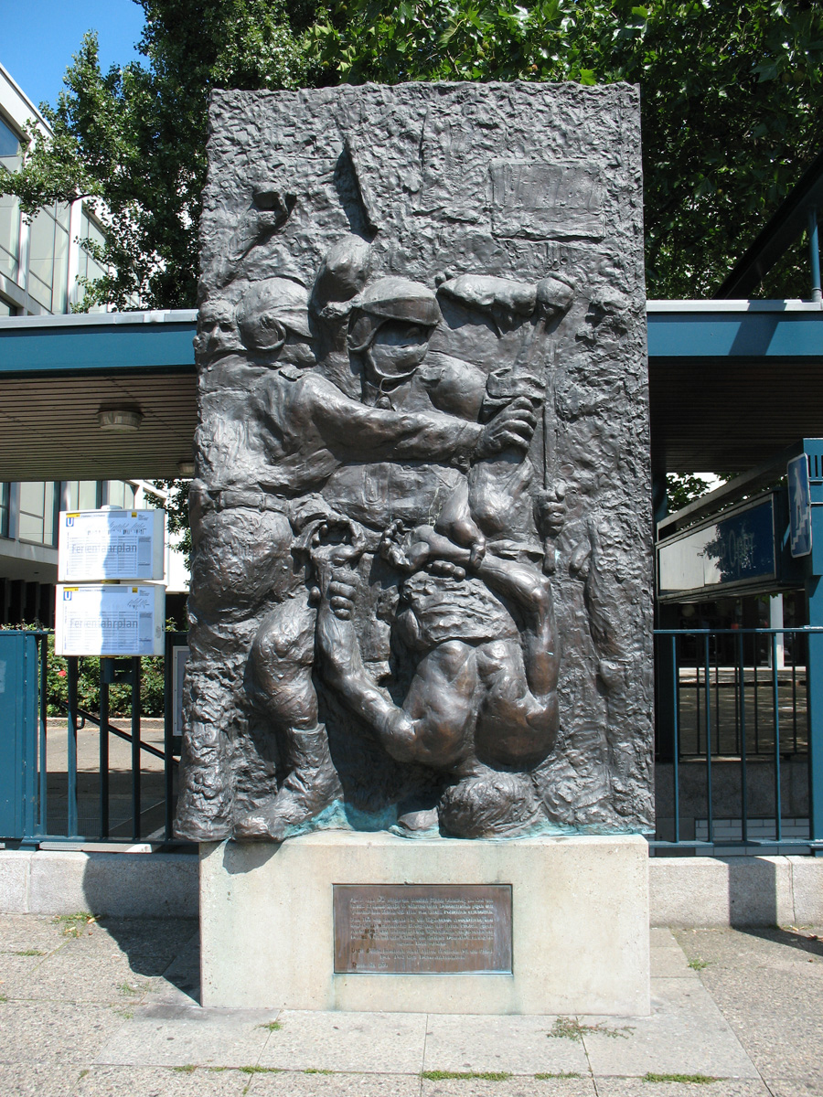 "Der Tod des Demonstranten" von Alfred Hrdlicka. Gedenkrelief für Benno Ohnesorg vor der Deutschen Oper Berlin.